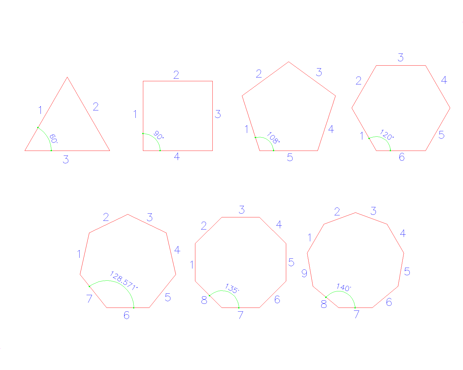 വശങ്ങളുടെ എണ്ണത്തെ അടിസ്ഥാനമാക്കി ബഹുഭുജങ്ങളെ തരം തിരിക്കുന്നു.